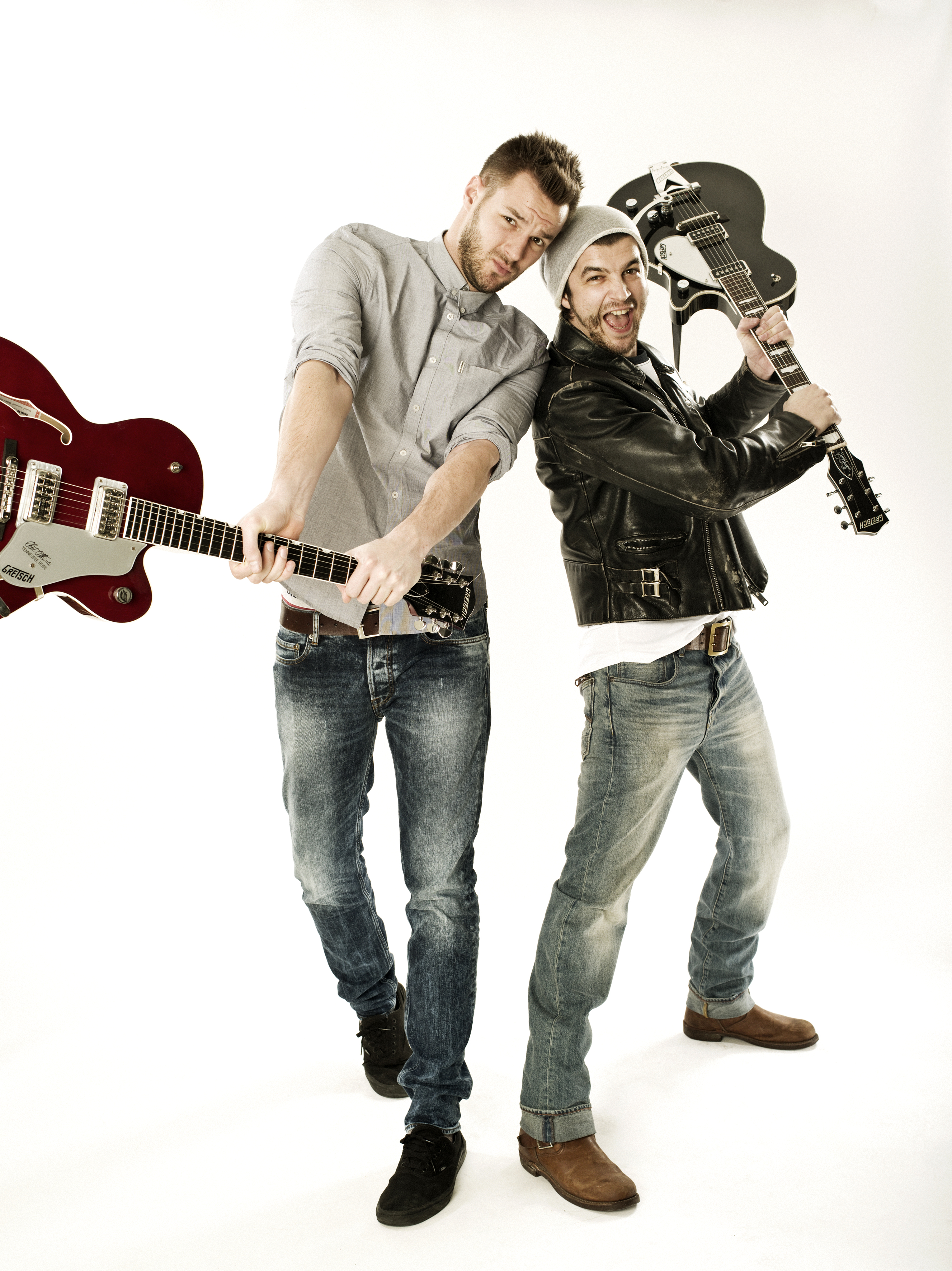 PizzeraJaus_color_03 ©MoritzSchell